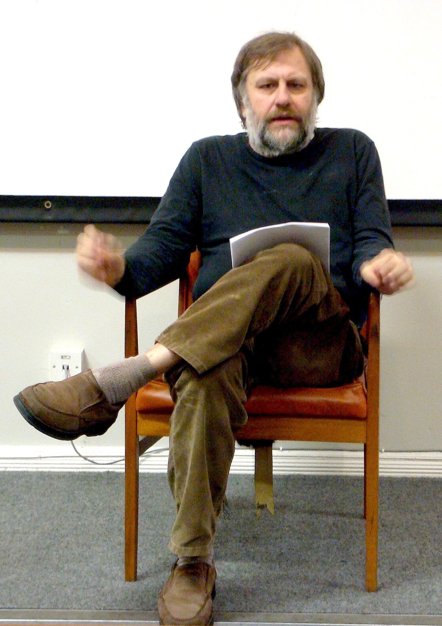 Slavoj Zizek in Liverpool, cropped version of Image:Slavoj Zizek in Liverpool.jpg